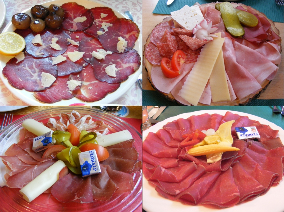 Trockenflei-Teller